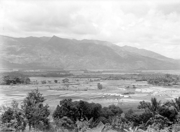 Negatief. Gezicht op de Rawahvlakte met aangrenzend bergland te Ambarawa.